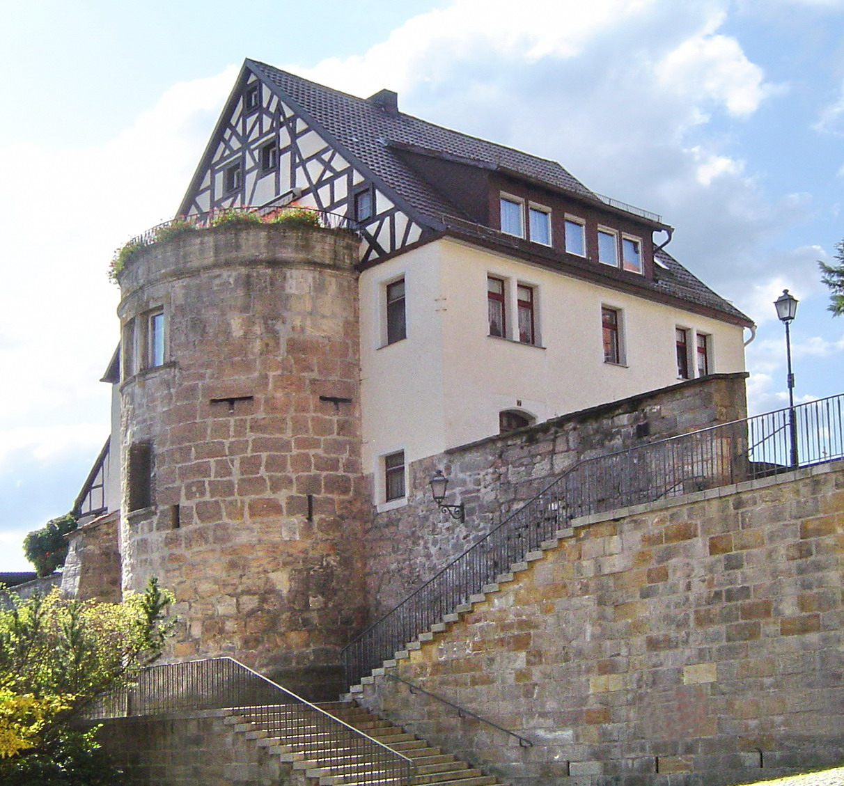 Creußen, Wohnhaus, Heziloplatz 2, Denkmal D-4-72-127-34